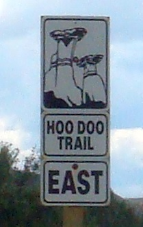 Panneau du sentier Hoo Doo, ou Hoo Doo Trail, dans l'est de l'Alberta, dans la région de Drumheller.